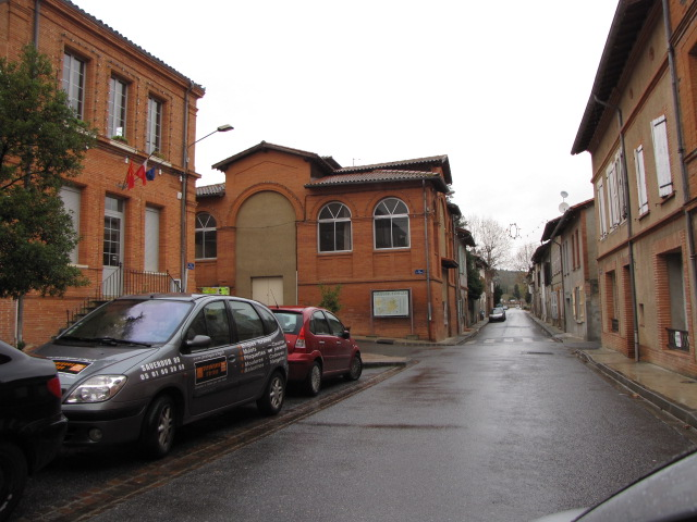 Mairie de Gaillac-Toulza